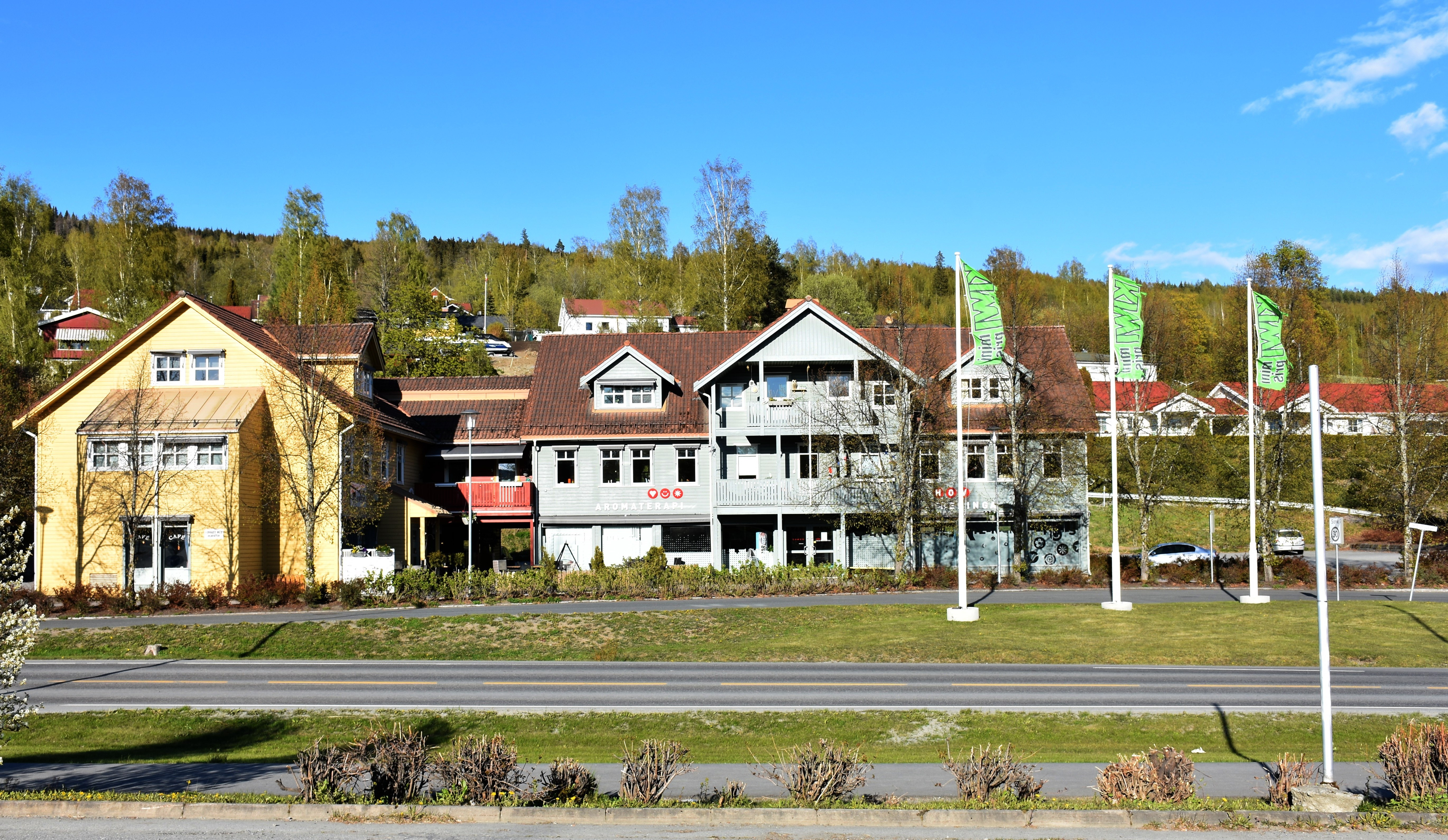 Primær fylkesvei 34 gjennom Hov i Land